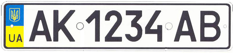 втомобильнйномер Украины с 2004 г.